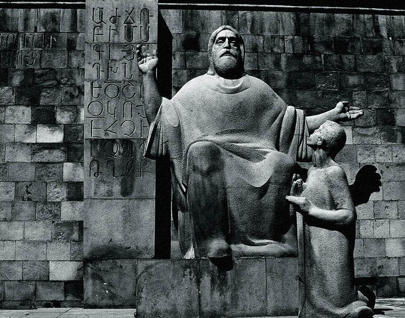 Месроп Маштоц и его ученик Корьюн, Ереван, Армения